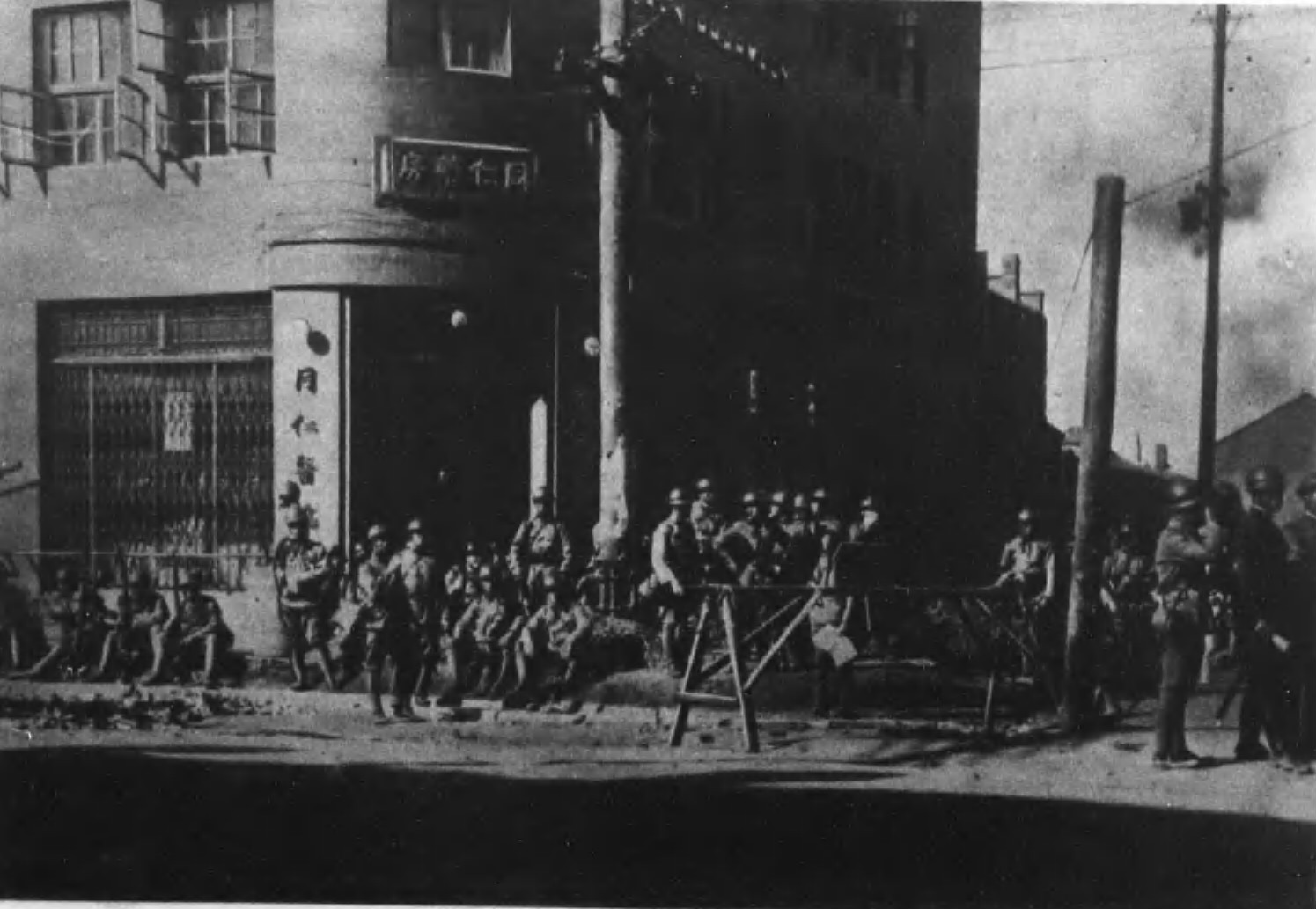 奉天城内同仁薬局前に於ける日本軍の守備（1931年）。